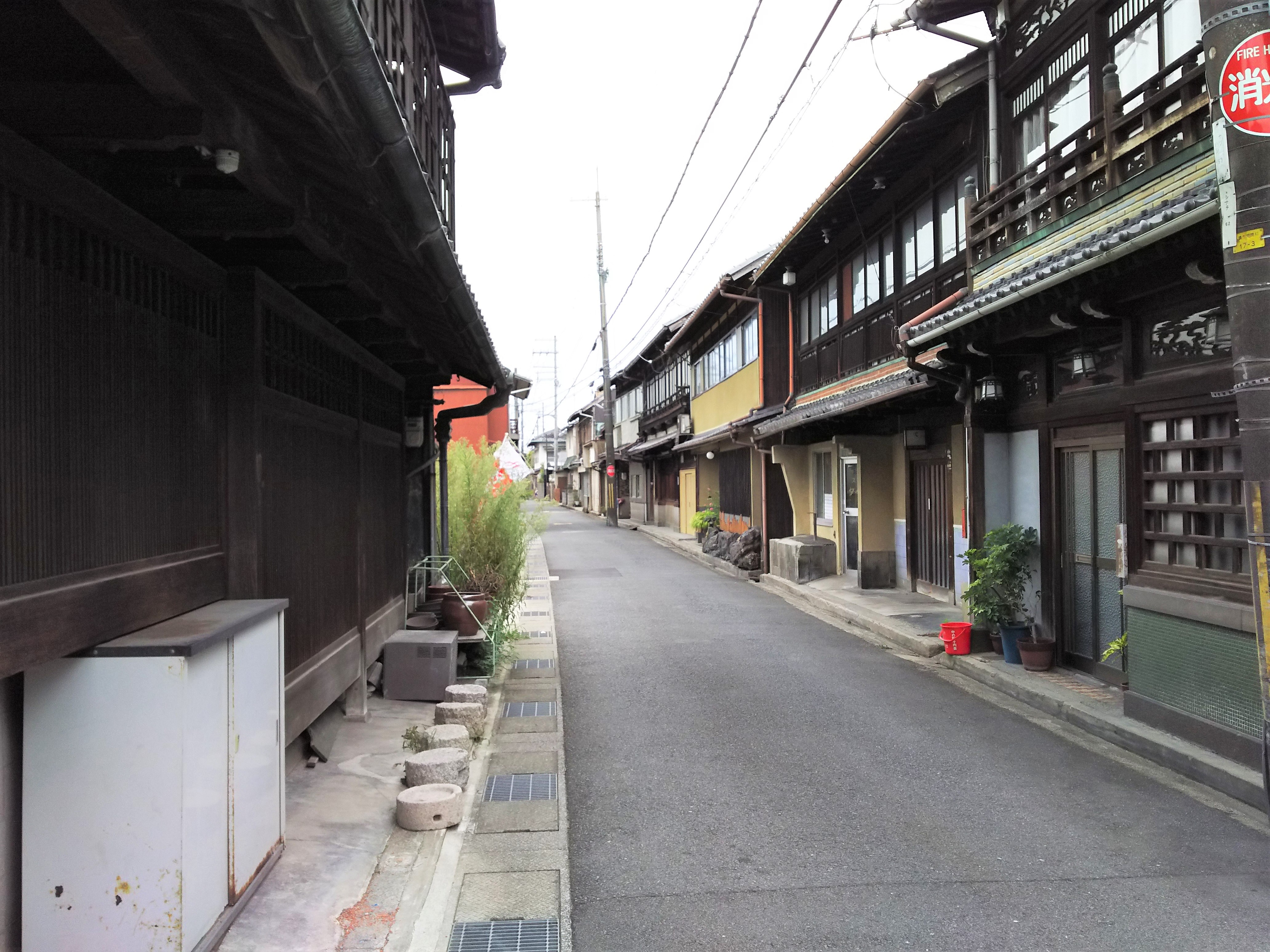 遊郭街の面影を残す橋本の街並み（京都府八幡市）